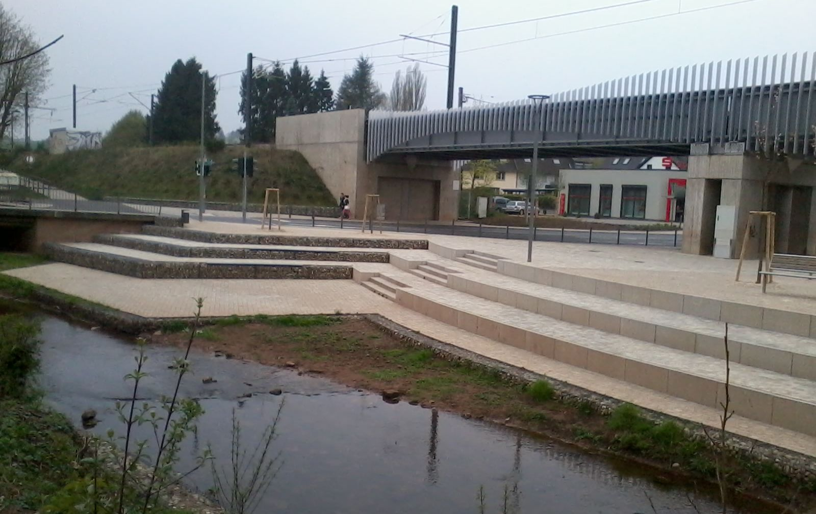 Walpershofens neue "Dorfmitte am Bach" (eröffnet am 27.09.2013) und die 2010 erneuerte Saarbahnbrücke (Eisenbahnüberführung über die L136)